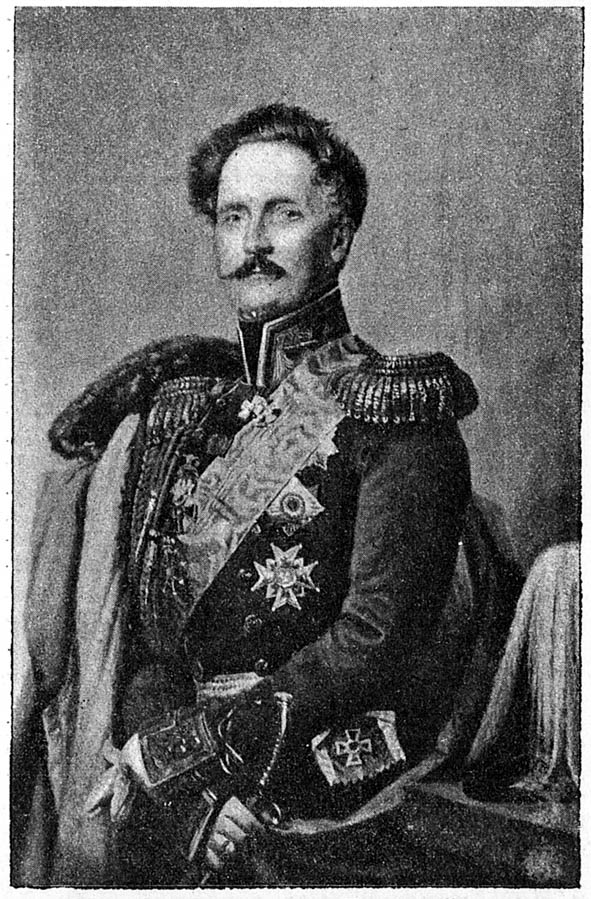 генерал И. Р. Анреп-Эльмпт Чин/звание: «Генерал от кавалерии»